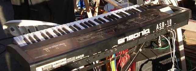 Ensoniq ASR-10